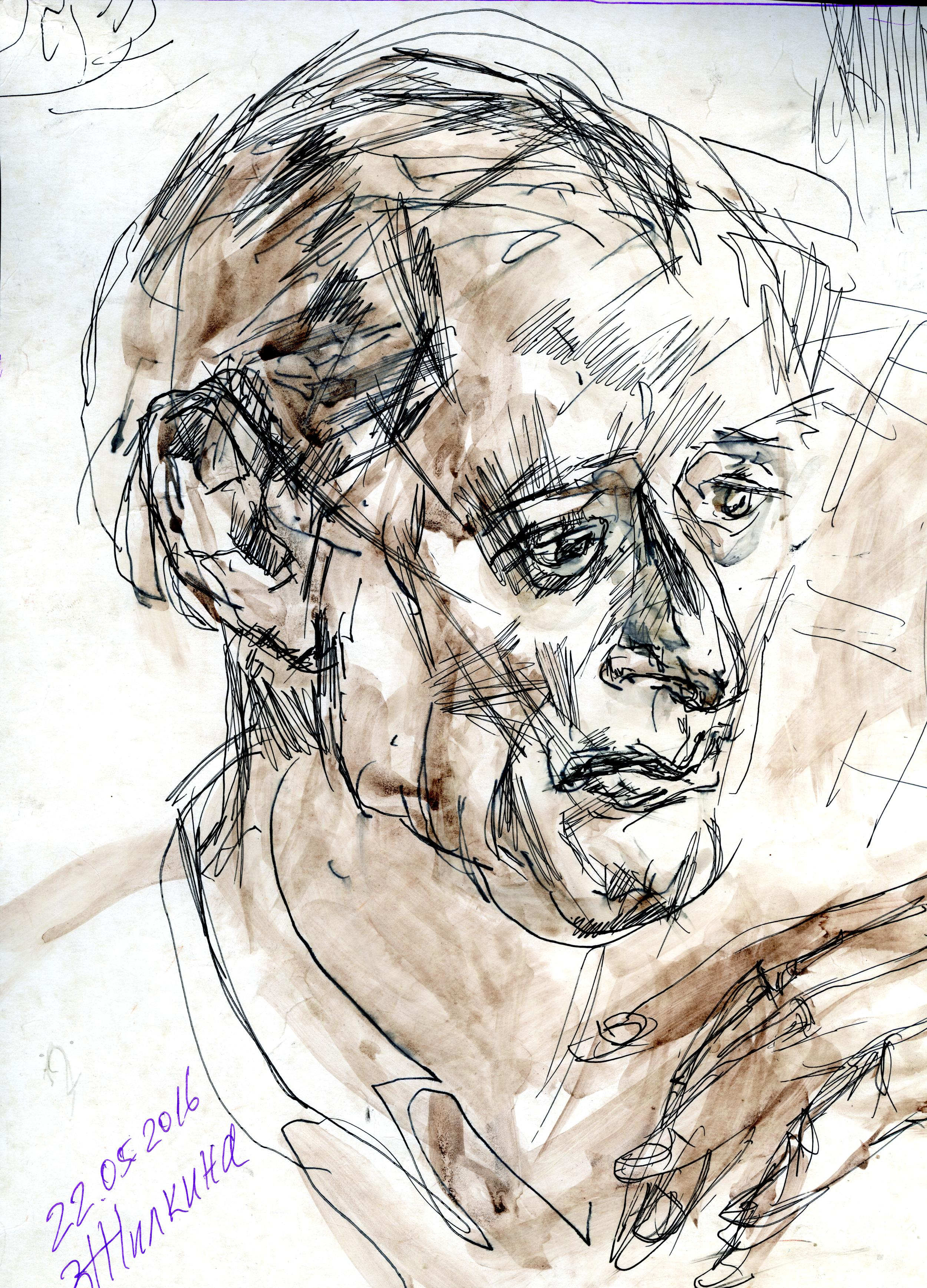 Портрет Уильяма Брумфилда работы Зои Викторовны Жилкиной